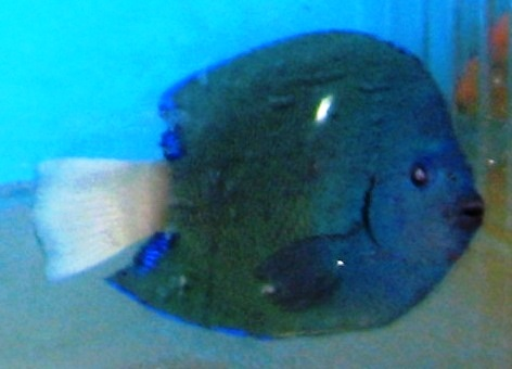 Recorte de Holacanthus limbaughi.jpg para aislar espécimen